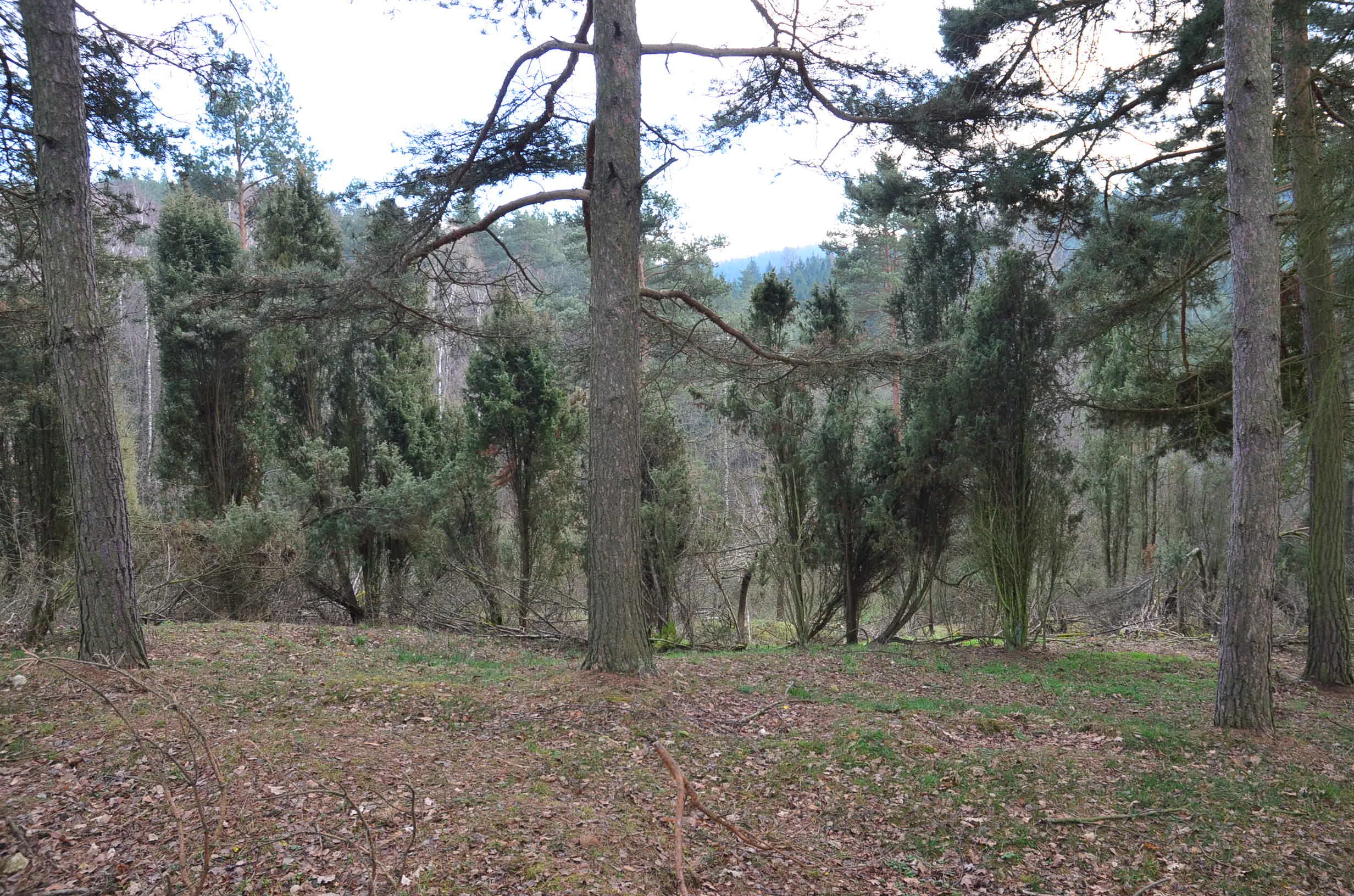 Přírodní památka Na ostrově s výskytem jalovce obecného.